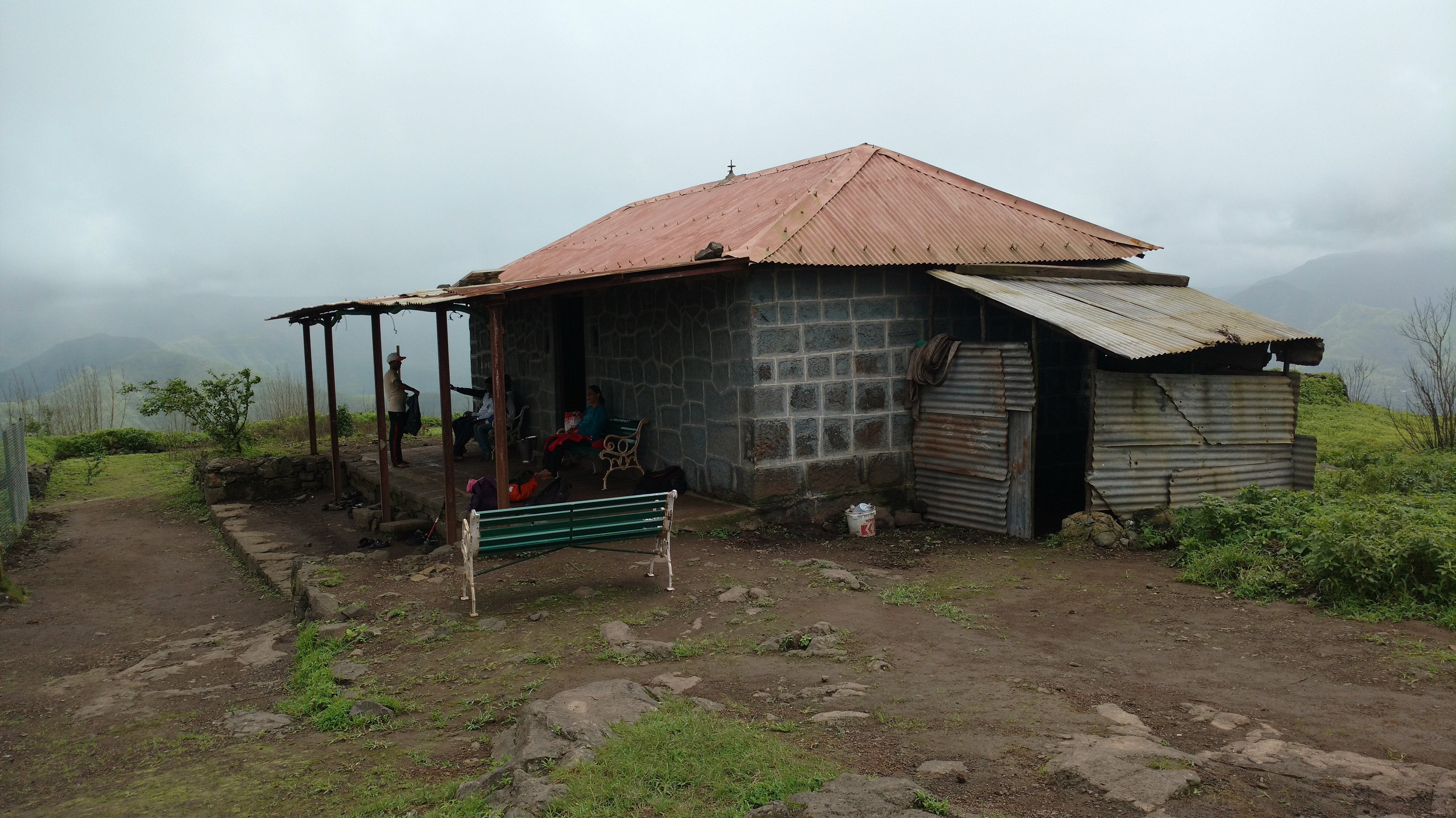 Rohidmalla temple; Rohida fort